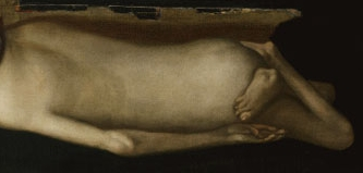 Bildnis eines behinderten Mannes, Schloss Ambras, Detail